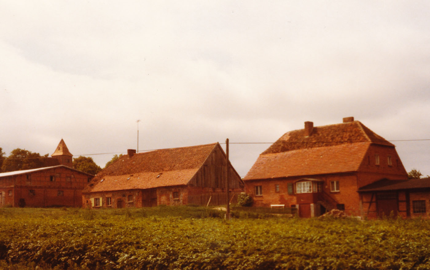 Gutshaus Genzkow Datum: um 1980 Urheber: verstorbene Bekannte der eigenen Familie Quelle: privates Fotoarchiv der eigenen Familie (Foto stammt aus Nachlass)